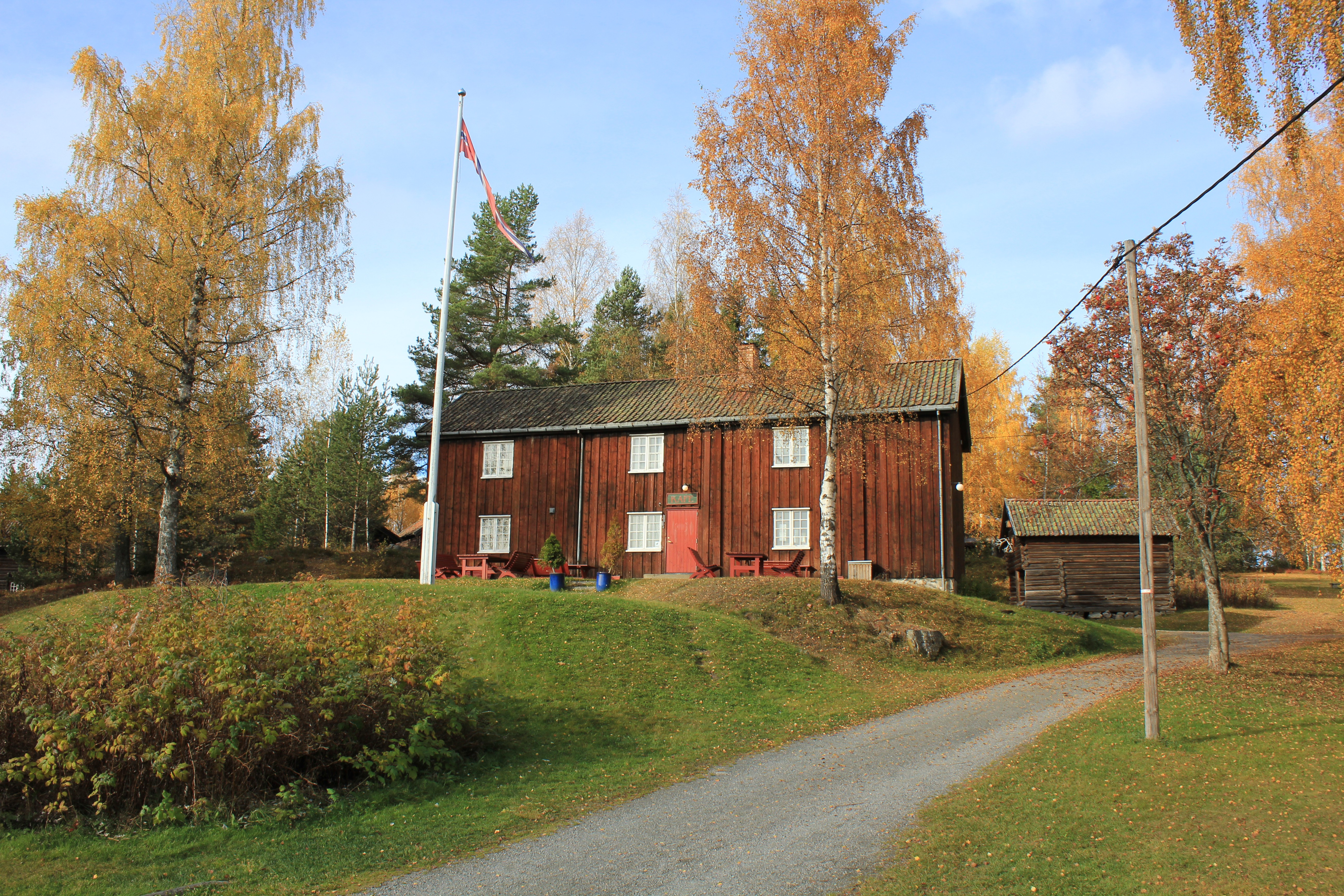 Kafèbygningen ved Eiktunet er flyttet fra Seval i Vardal.